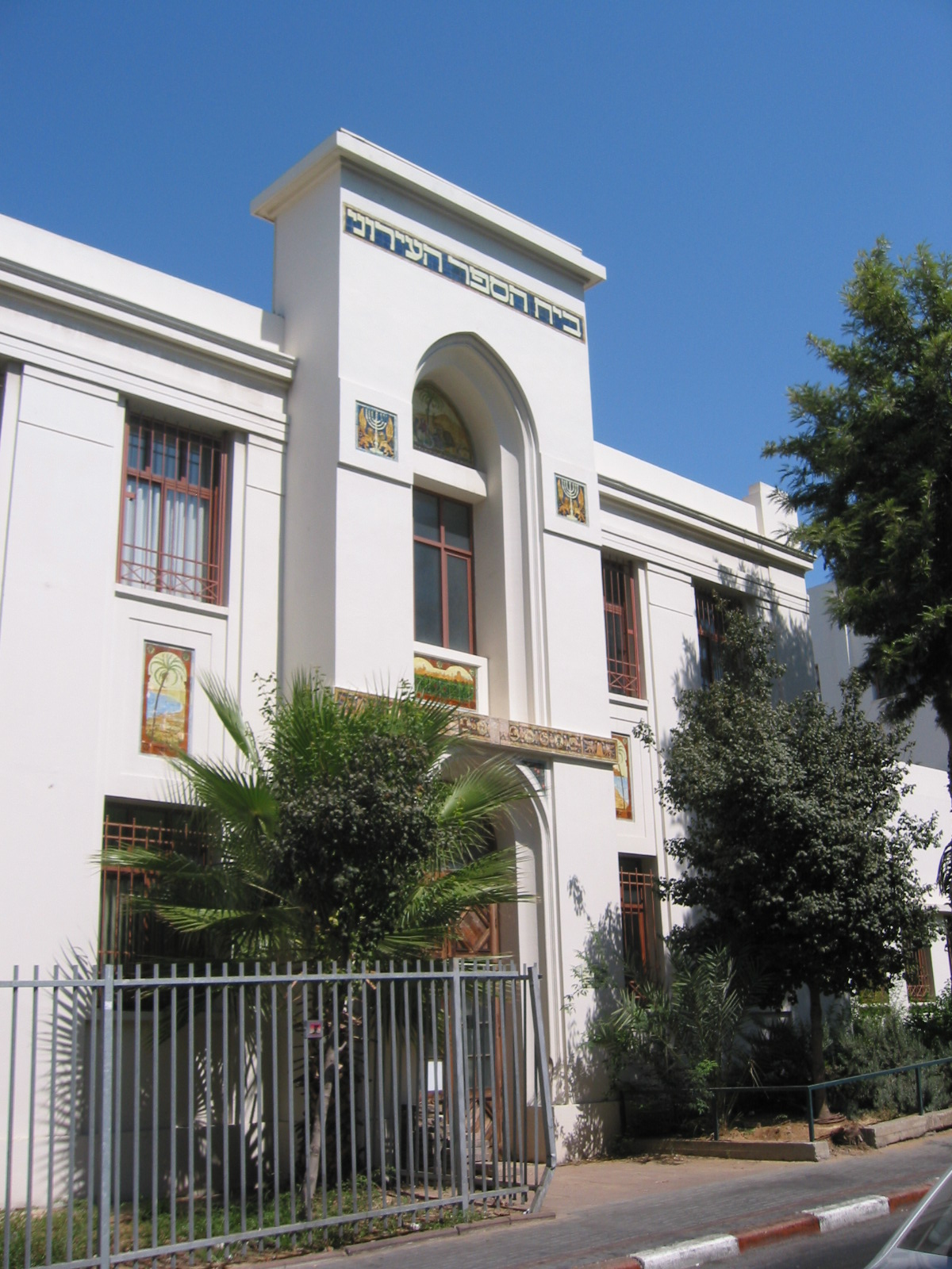 בית הספר בית יעקב.